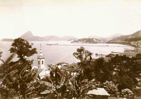 Praia de Santa Luzia, aproximadamente 1893/1894. Vista tomada do morro do Castelo para o morro da Glória. Em primeiro plano, o telhado e as torres da igreja de Santa Luzia e o telhado do casario da rua Santa Luzia. Ao fundo, o Pão de Açúcar e o morro da Glória, destacando-se a igreja de Nossa Senhora do Outeiro. À direita, as construções da orla marítima.